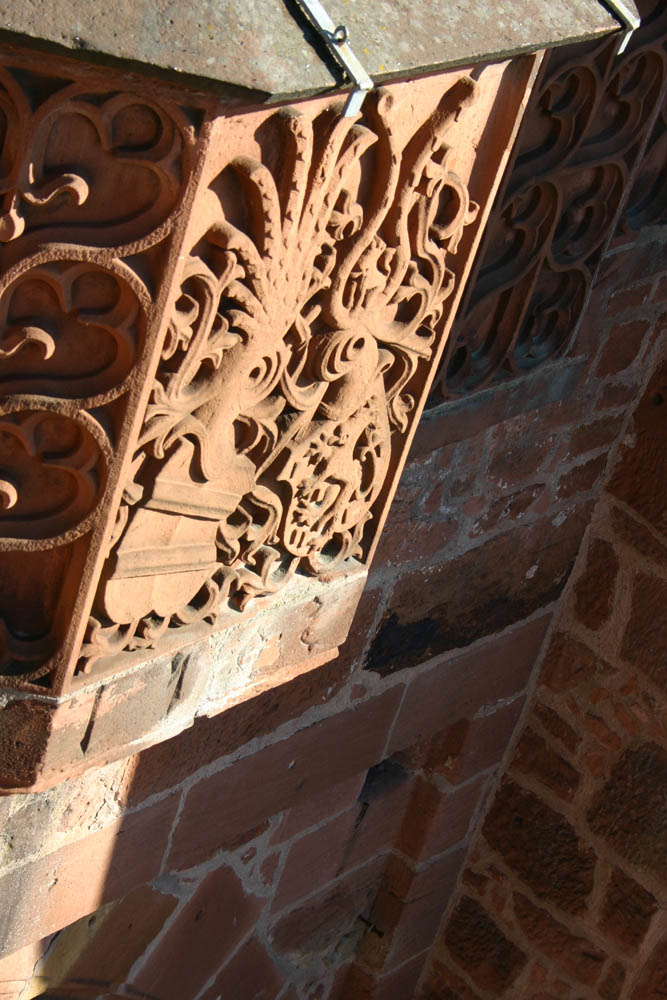 Beschreibung: Untertor in Büdingen - Detail: Wappenschild Ursprung: Selbst fotografiert von Sven Teschke am 10. Oktober 2004 Lizenzstatus: GNU FDL